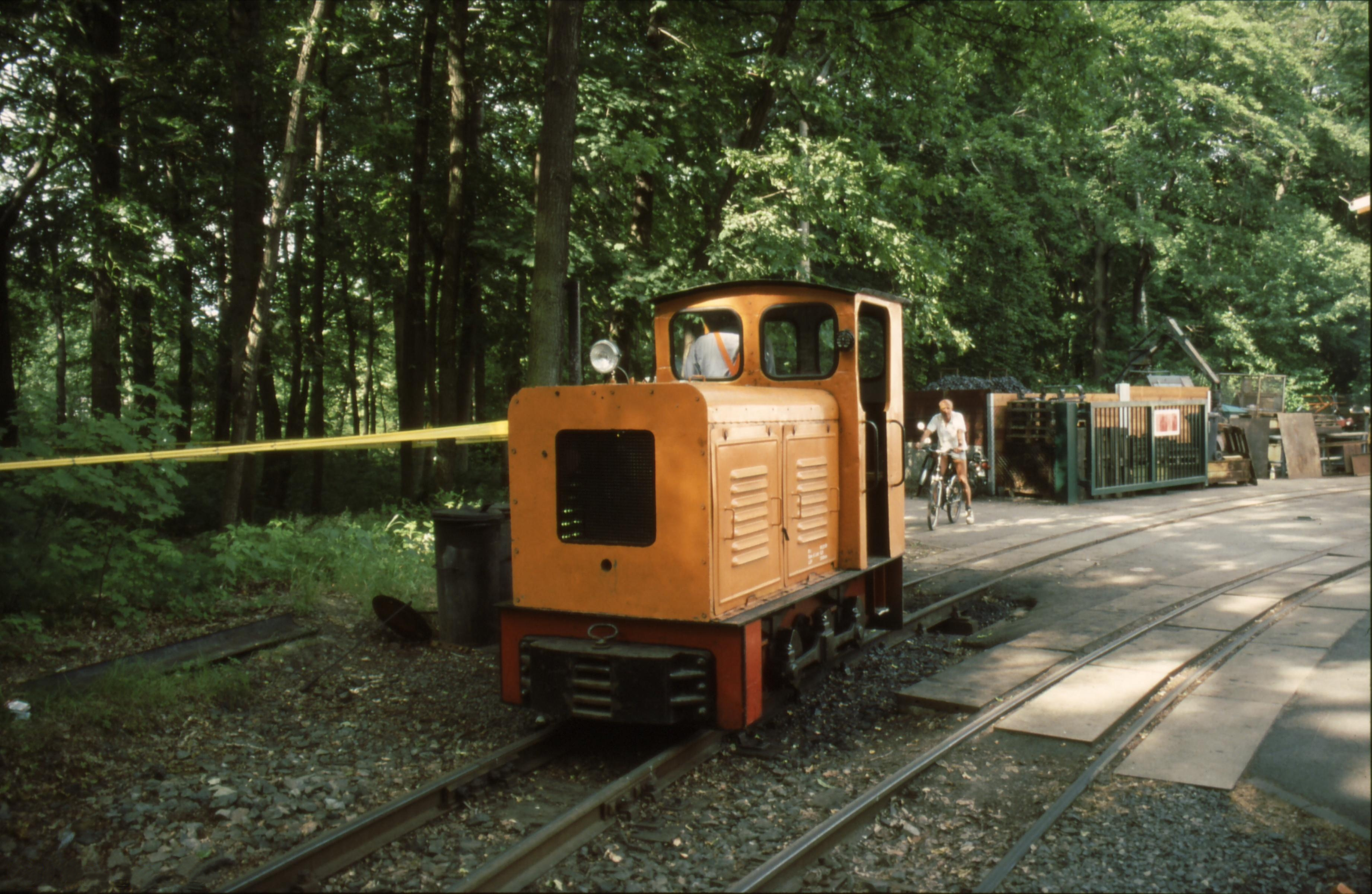 Die Lok 6004 rangiert vor dem Bw-Gelände, während die ersten Gäste für die Fahrzeugparade eintreffen